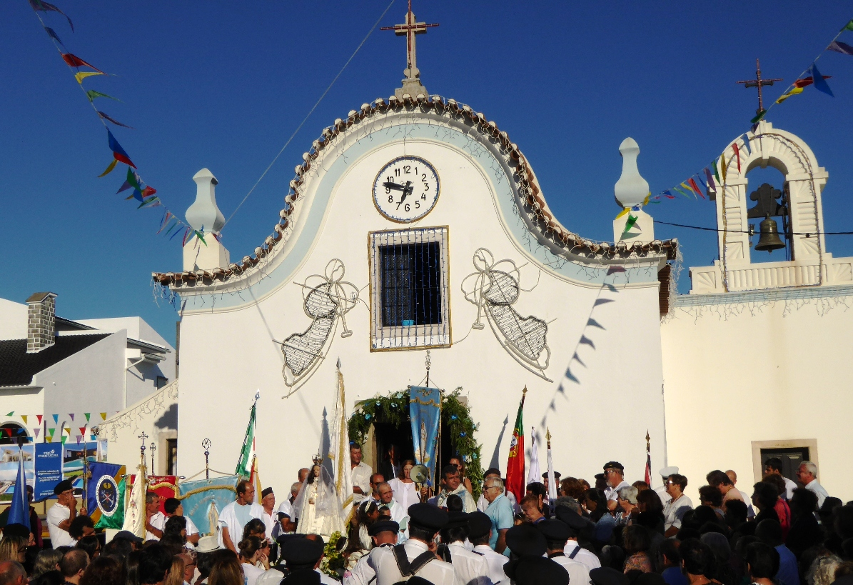 Fim da procissão em ferrel no 1º dia